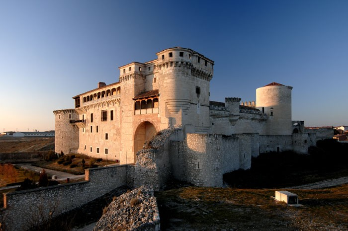 Castillo de Cuéllar